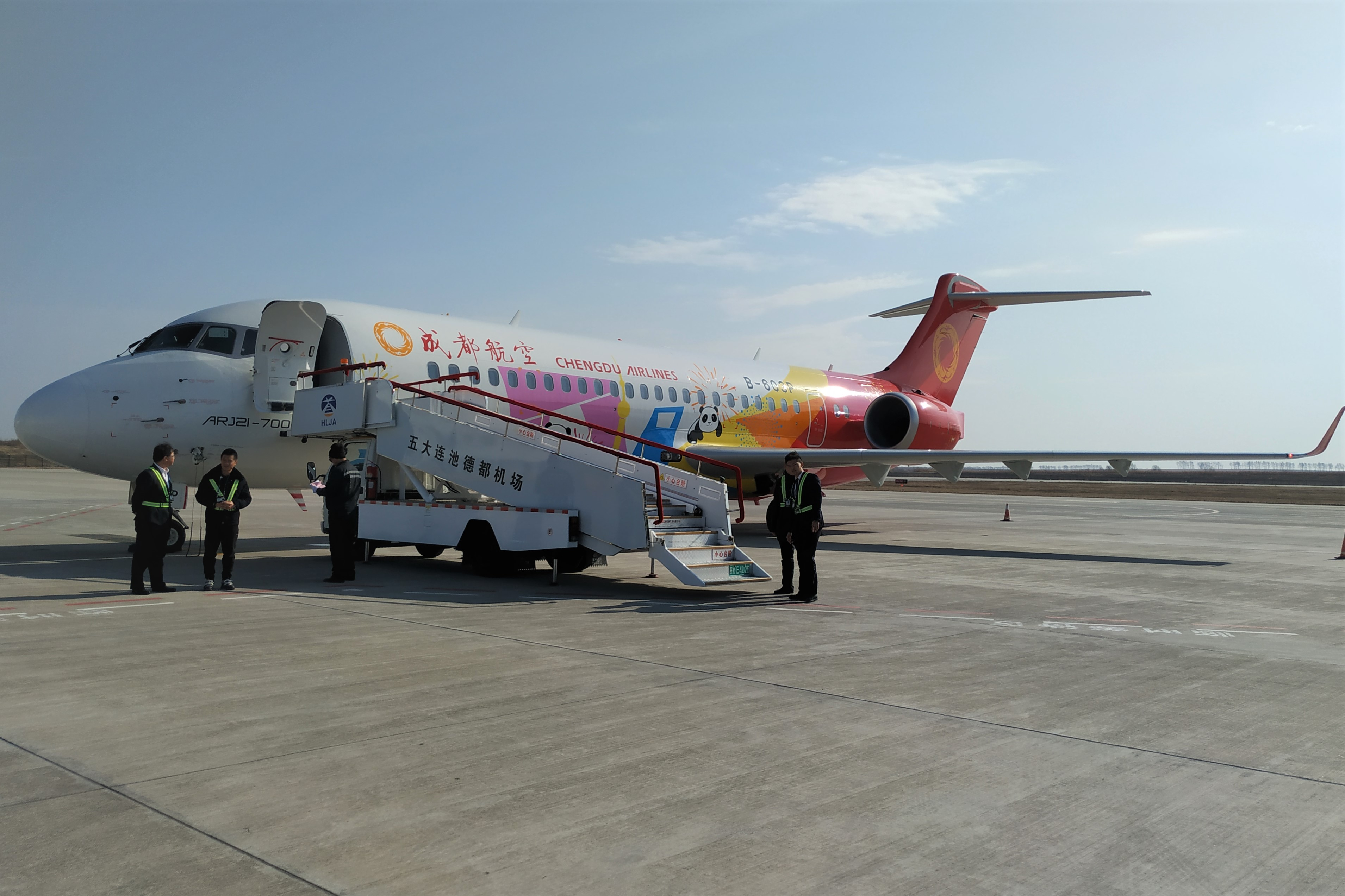 中文（中国大陆）: 注册号为B-803P的成都航空ARJ21-700在五大连池德都机场